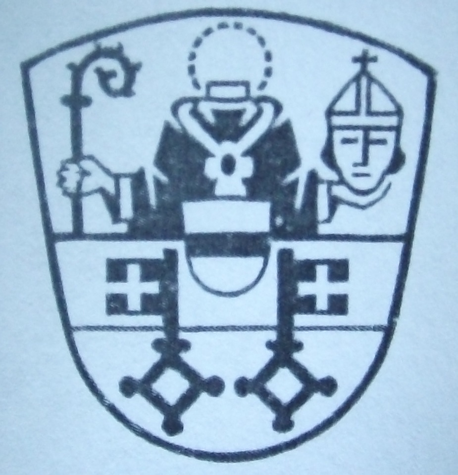 Wappen der Stadt Krefeld-Uerdingen a.Rh. v. 1931, aus Statistisches Jahrbuch II. Band 1926-1931